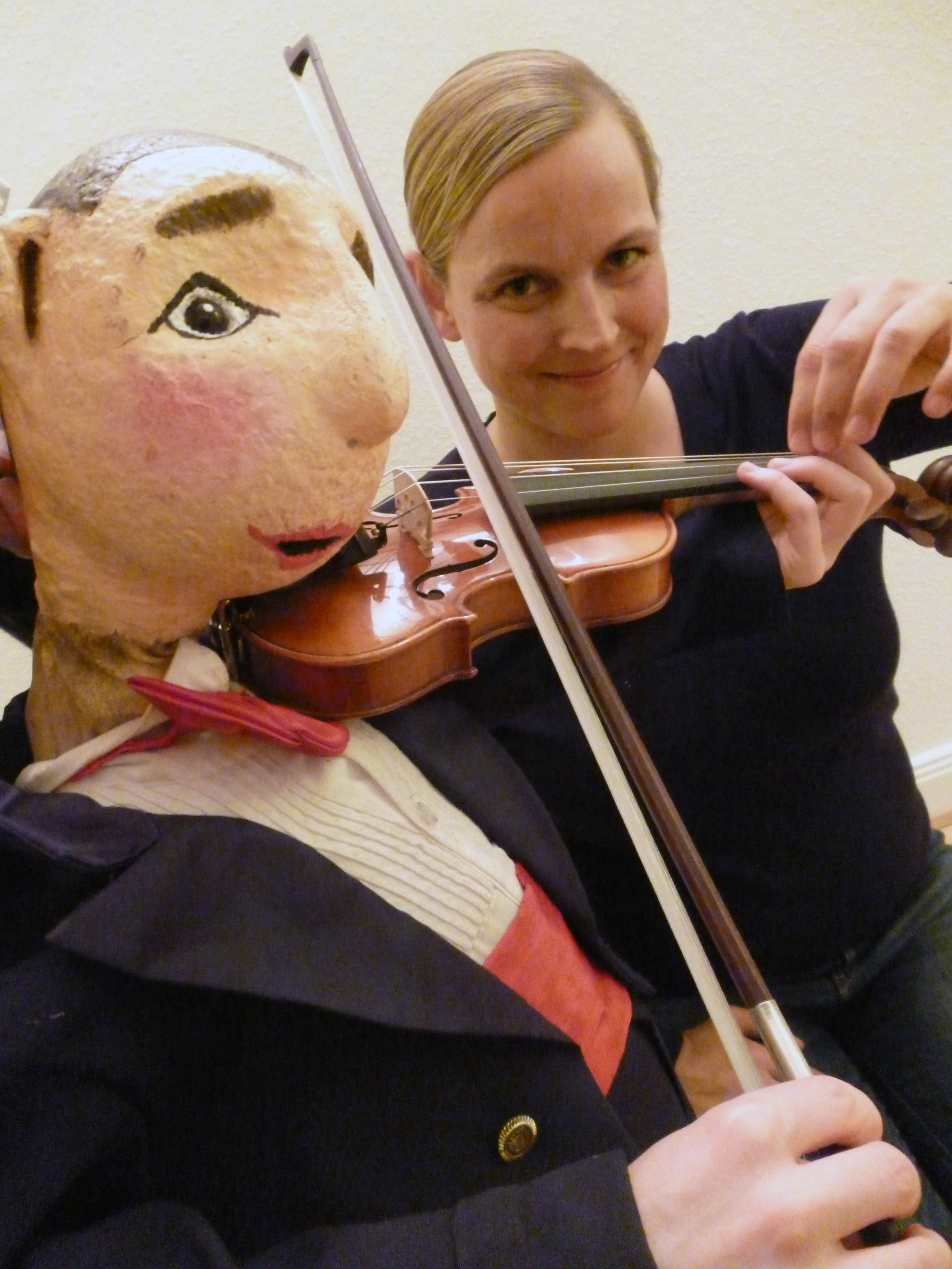 Geigerin Angelika Bachmann bei einer Instrumentenprobe mit Handpuppe Oskar.